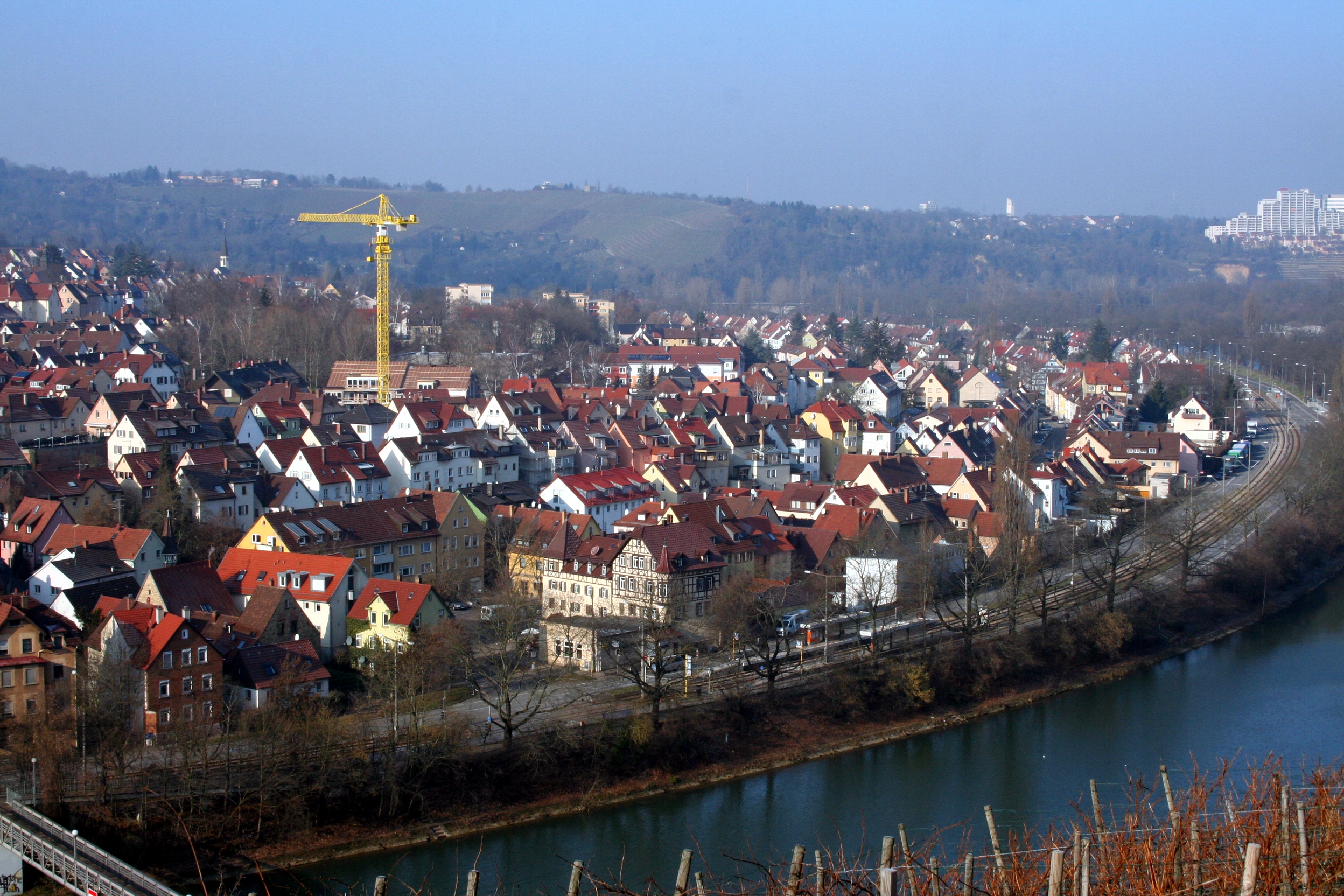 Stadtteil Stuttgart-Münster